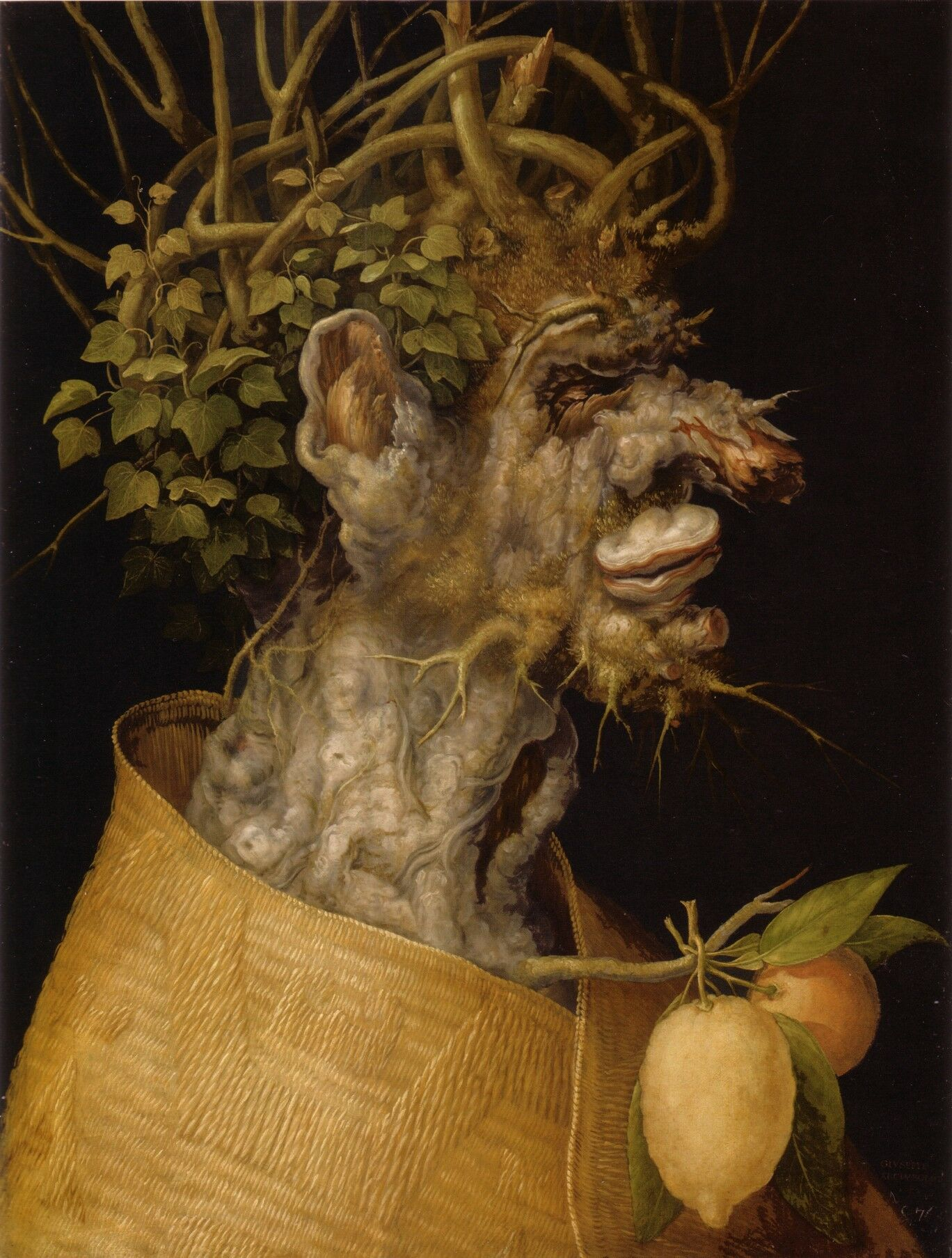 Winter The Winterlabel QS:Lde,"Der Winter" label QS:Len,"The Winter"